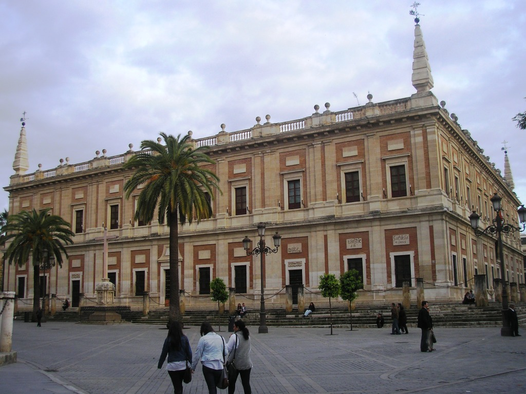 El Archivo de Indias se encuentra en la Plaza del Triunfo de Sevilla. Antiguamente era la lonja y, posteriormente, pasó a ser el lugar donde se guardaban todos los documentos que venían de las "Indias" (América)